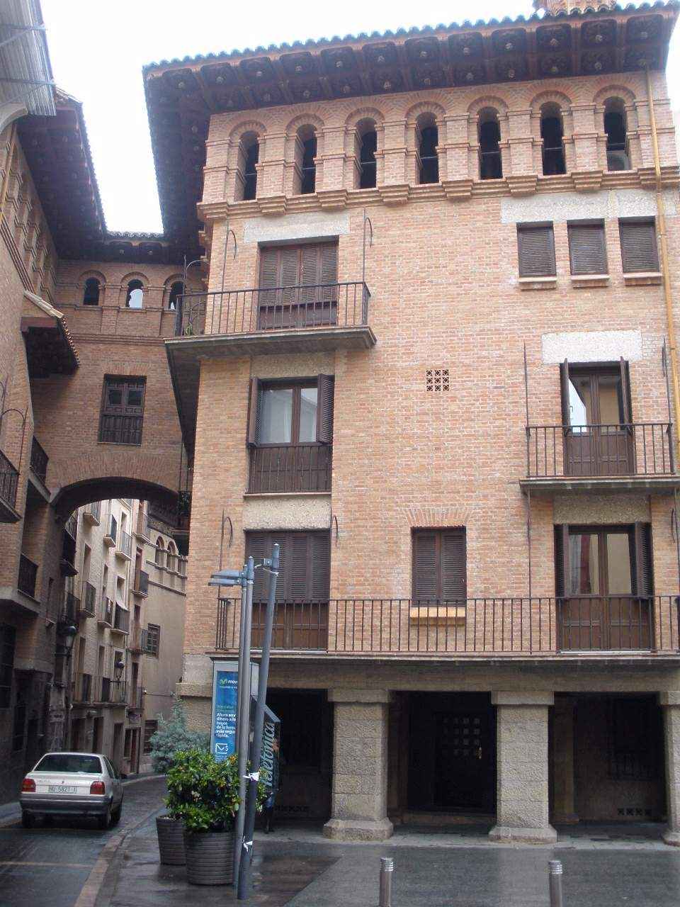 Barbastro, Huesca - Centro Cultural Entrearcos (casa natal de San Josemaría Escrivá de Balaguer)